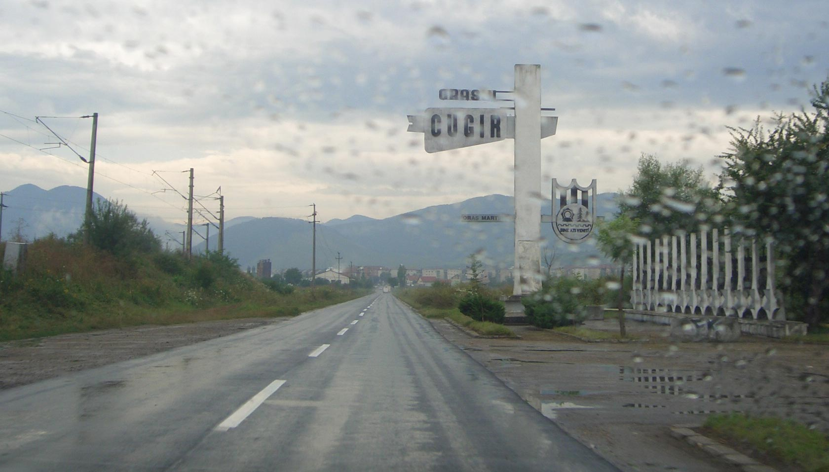 Das Ortseingangsschild der Stadt Cugir in Rumänien. Solch schönen Eingangsschilder findet man nur wenige.